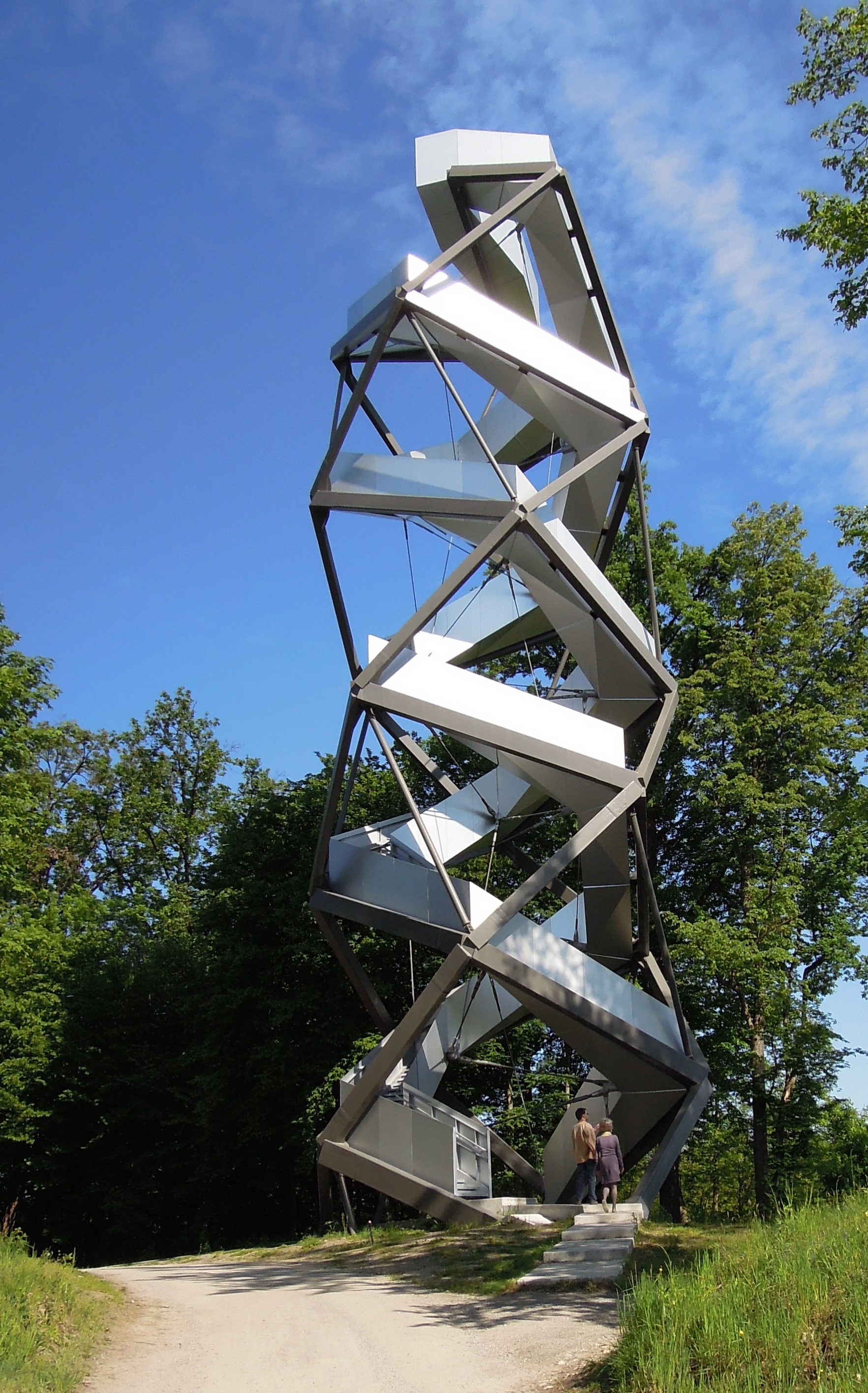 Murwarte, Aussichtsturm über die Auwälder der Mur